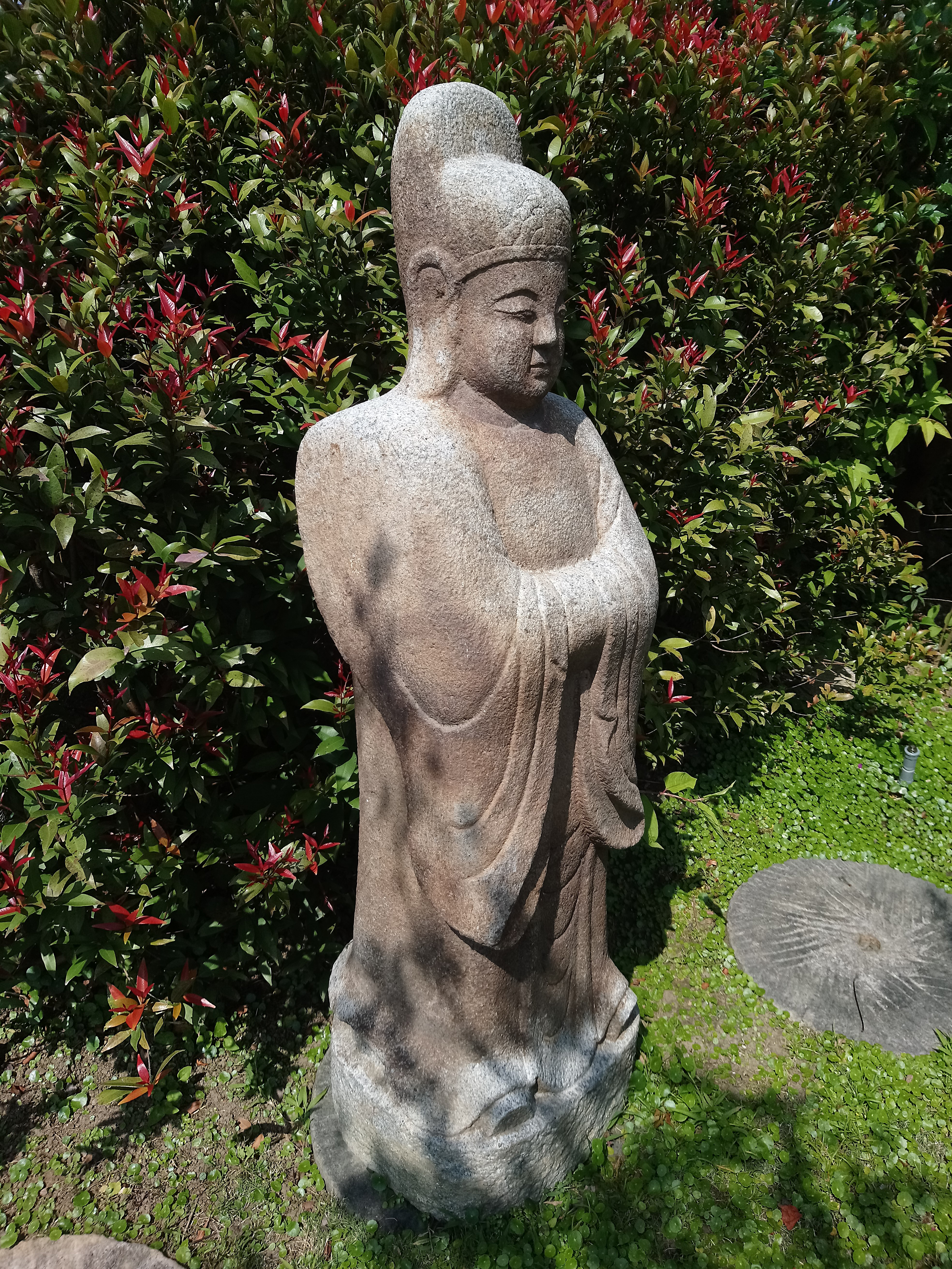 草山玉溪所藏文官石翁仲,臺北市士林區陽明山次分區永福里